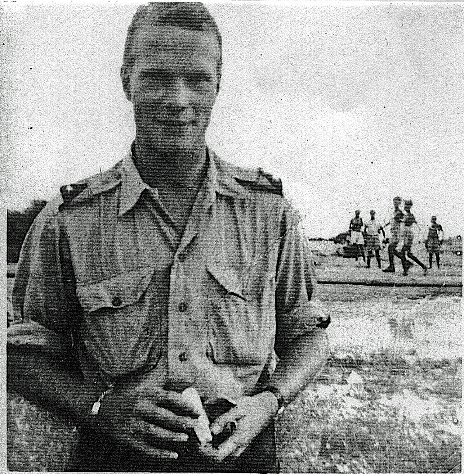 Flip Winckel in 1944 — Royal Dutch East Indies Army